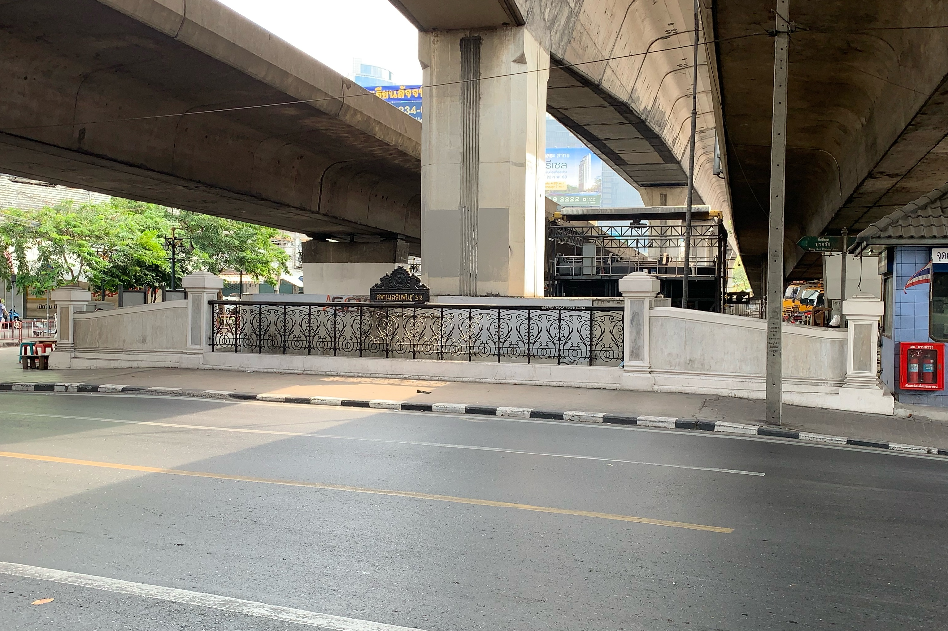 สะพานเฉลิมพันธุ์ ๕๓